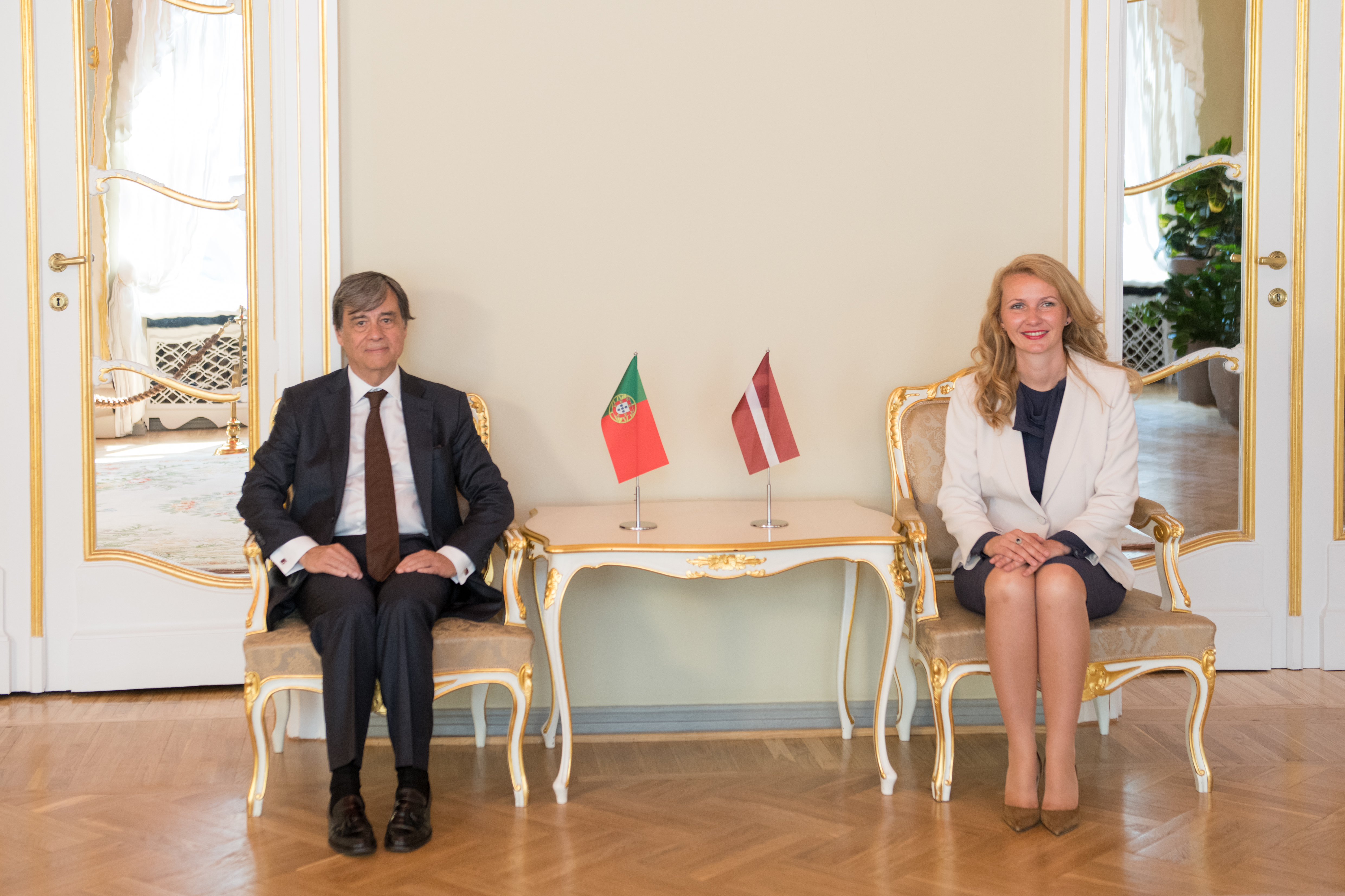 2018.gada 17.jūlijs. Saeimas priekšsēdētājas biedre Inese Lībiņa-Egnere tiekas ar Portugāles Republikas ārkārtējo un pilnvaroto vēstnieku Latvijas Republikā Enrīki Silveiru Boržešu (Henrique Silveira Borges) Foto: Ieva Ābele, Saeima Izmantošanas noteikumi: saeima.lv/lv/autortiesibas